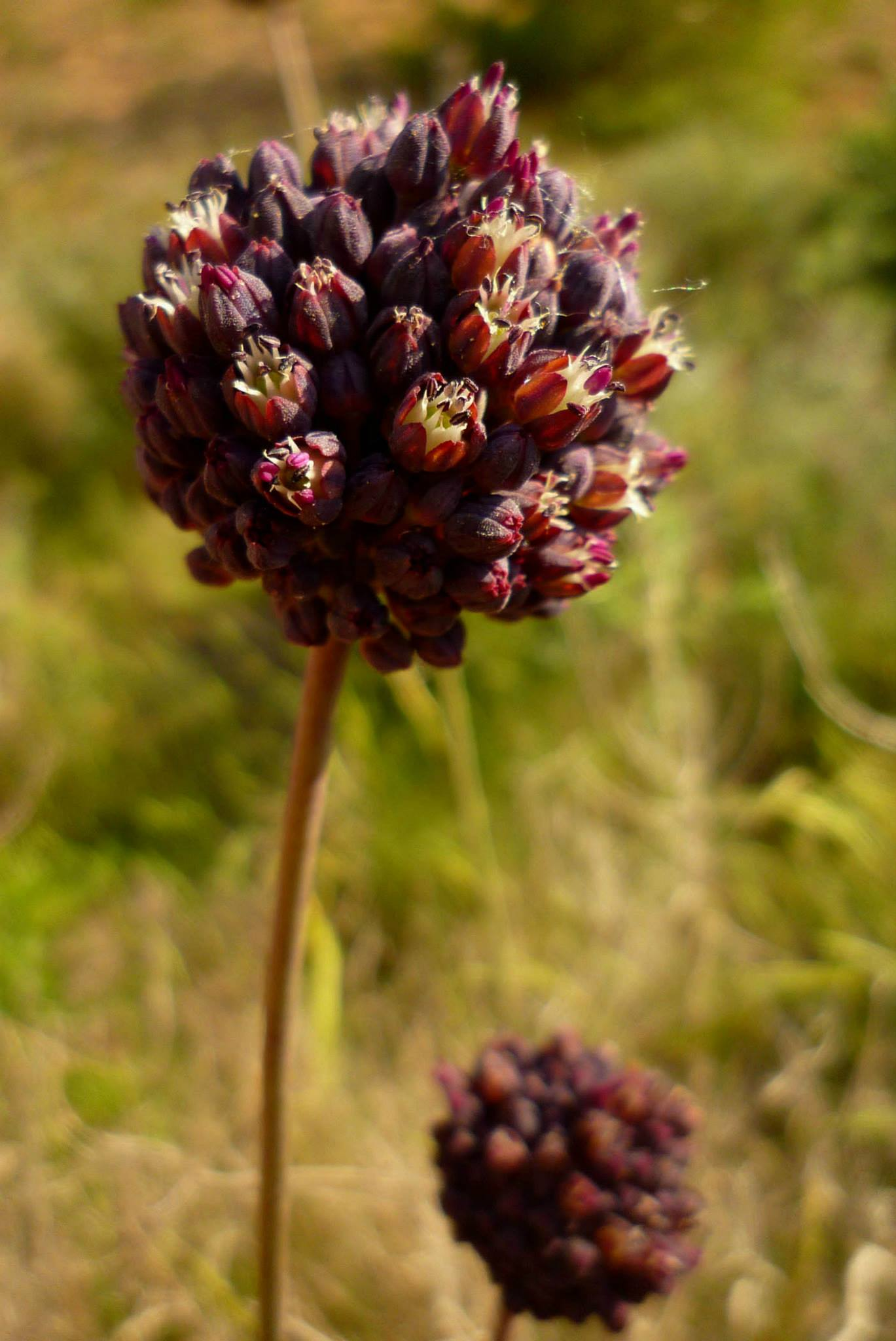 Allium melananthum en Cartagena (España).